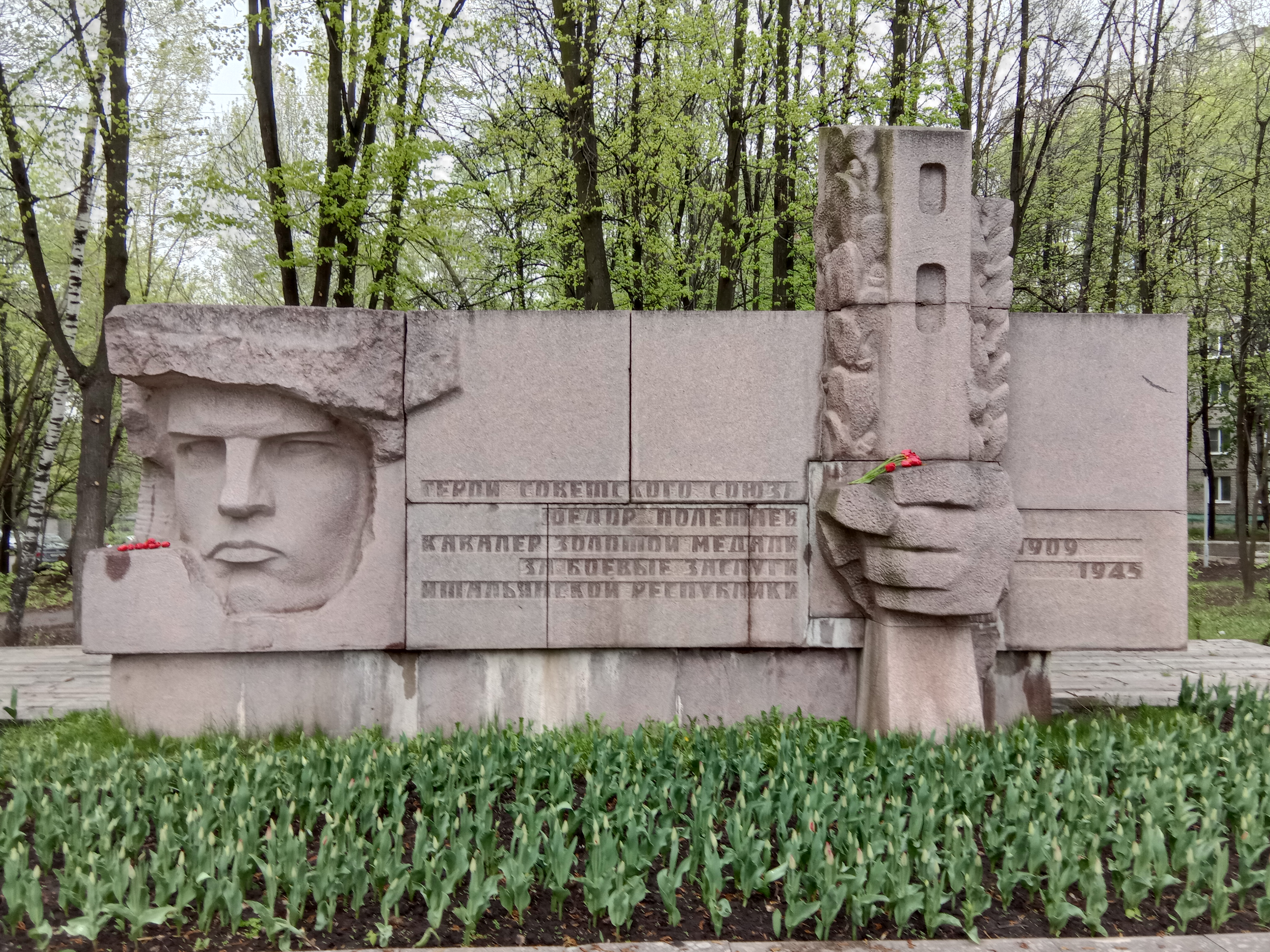 Памятник Фёдору Полетаеву (Рязань)